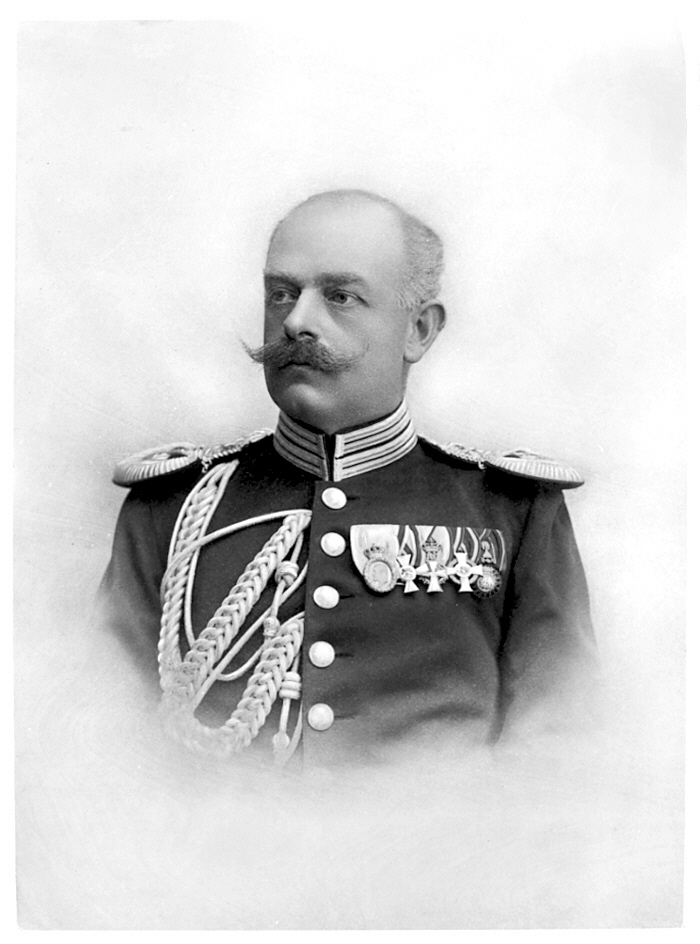 Henrik de Maré. Fotografi från 1898-1899 taget av Gösta Florman. Finns i Hallwylska museets samlingar.